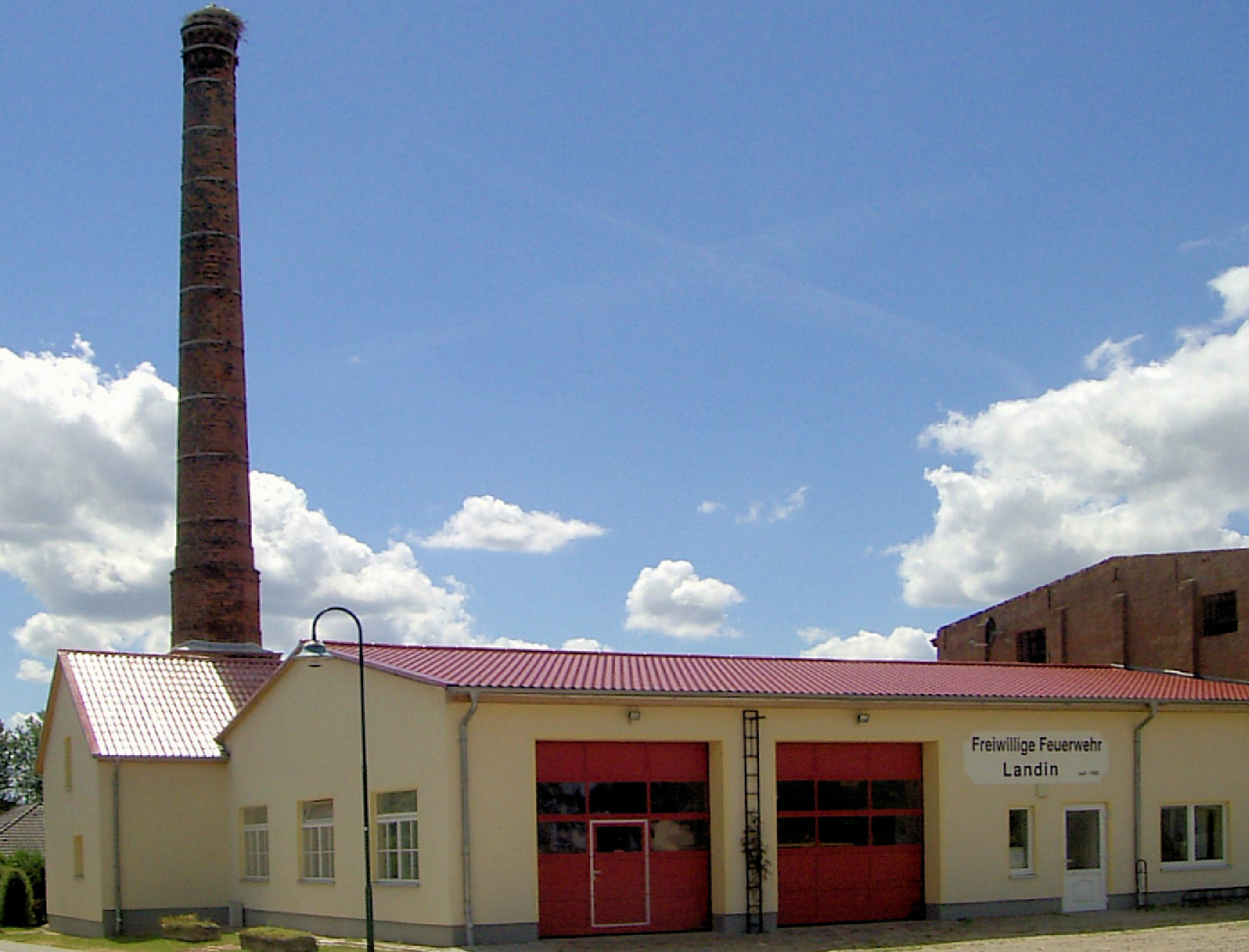 Feuerwehrgebäude in Landin